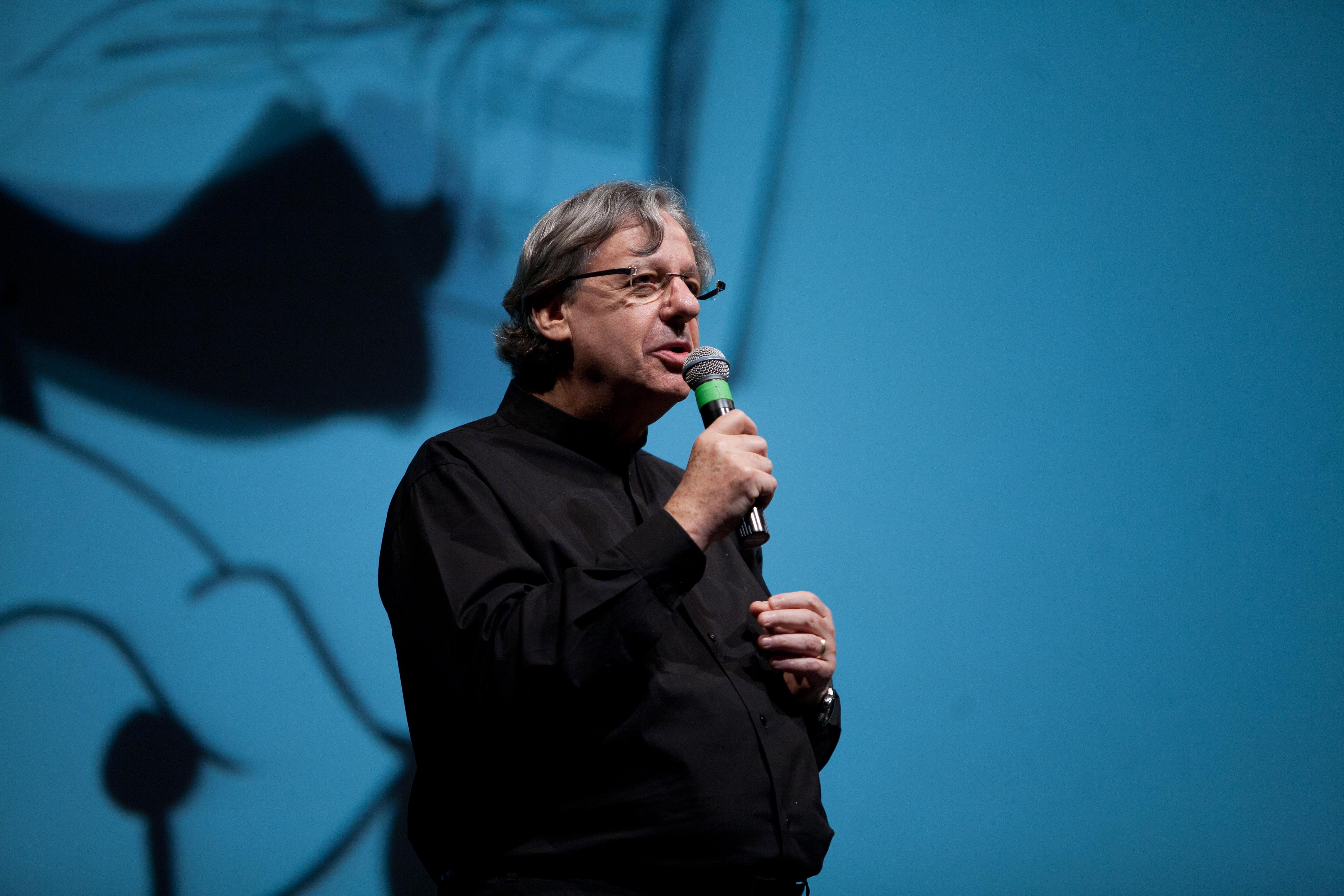 Maestro John Neschling na apresentação da Companhia Brasileira de Ópera, no Palácio das Artes em Belo Horizonte. Foto: Pedro França/MinC